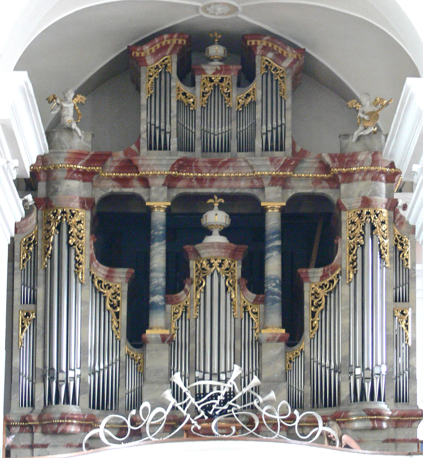 Pfarrkirche St. Martin, Langenargen, Bodenseekreis Orgelprospekt (neobarock) von Reinhold Schäle, Ravensburg, 1976